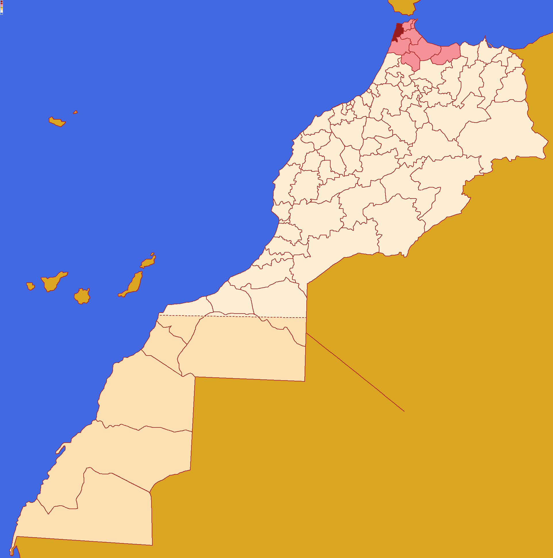 Localização da prefeitura de Tânger-Assilah dentro da região de Tânger-Tetuão-Al Hoceïma e dentro de Marrocos. Conforme a reforma administrativa de 2015.